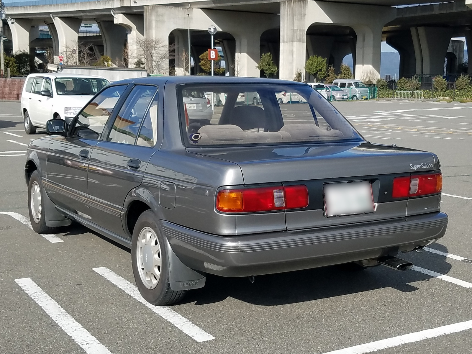 サニー 1500スーパーサルーン（前期型）